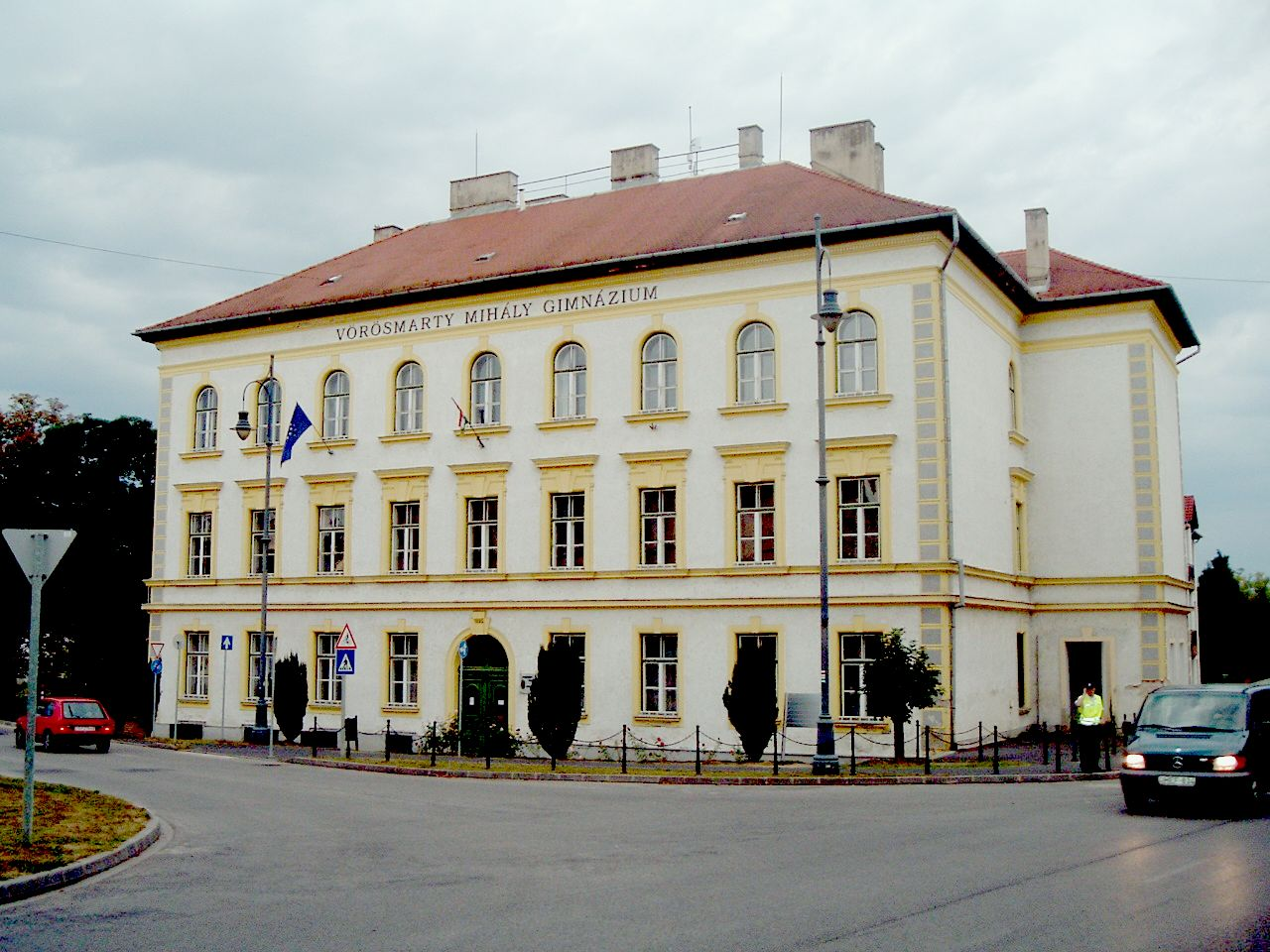 The building of the Vörömarty Grammar School in Szentgotthárd. SZOI Vörösmarty Mihály Gimnázium. - Szentgotthárd, Széll Kálmán tér 1